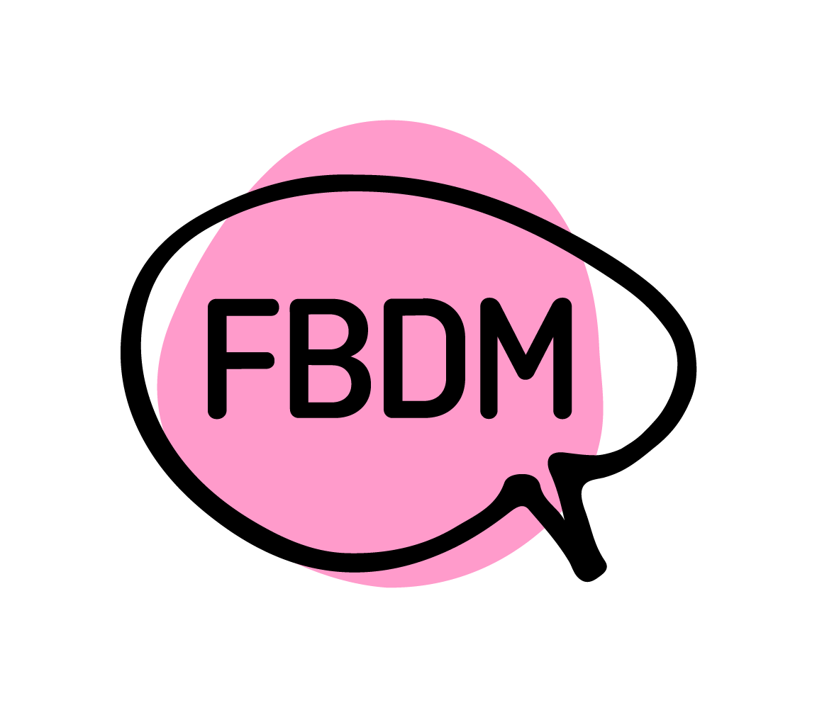 Logo du FBDM depuis 2018